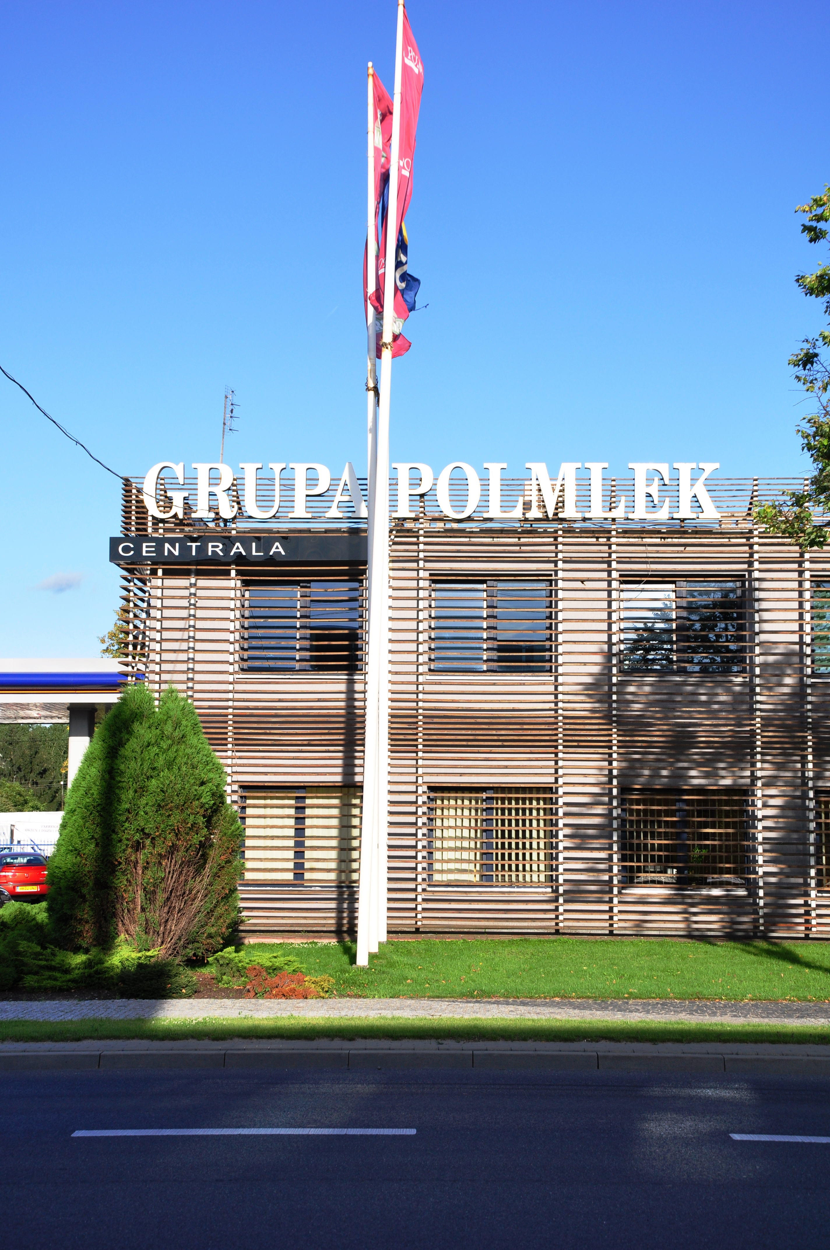 Zentrale Polmlek